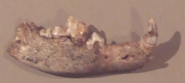 Unterkiefer eines Hundes aus dem Doppelgrab von Oberkassel Aufnahme: 10. September 2006 Url